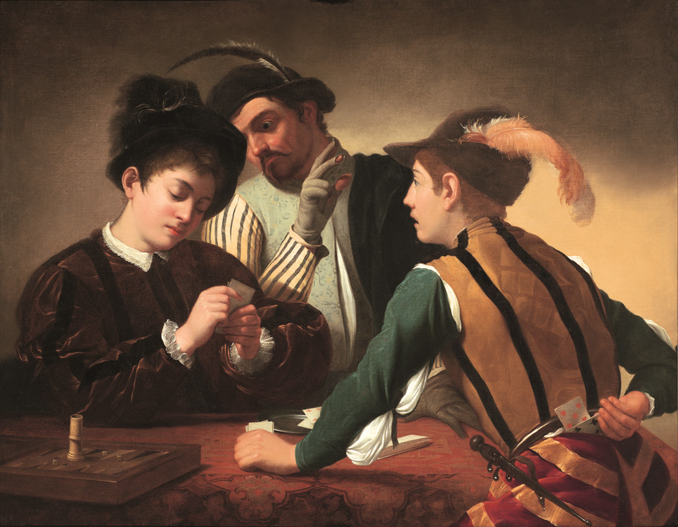 Caravaggios, i Bari, Clerkenwell.jpeg